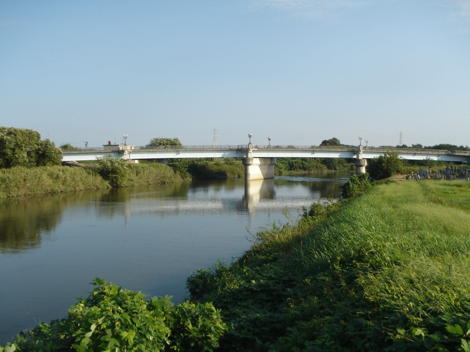 境川に架かる柳津大橋、岐阜県岐阜市